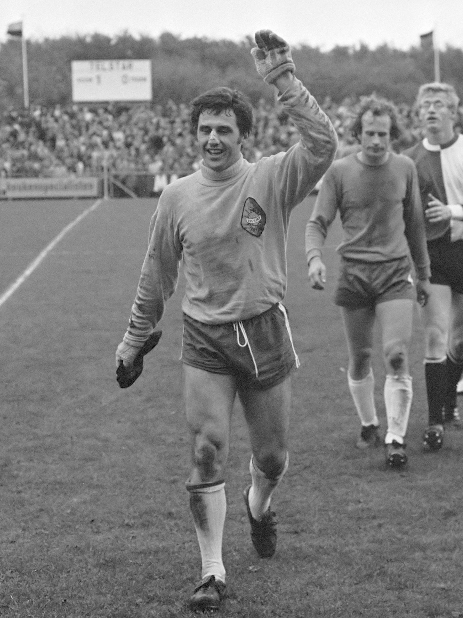 Telstar tegen Feijenoord 1-0; keeper Van der Meeren (Telstar) verlaat juichend veld, achter hem Van Daele 24 oktober 1970